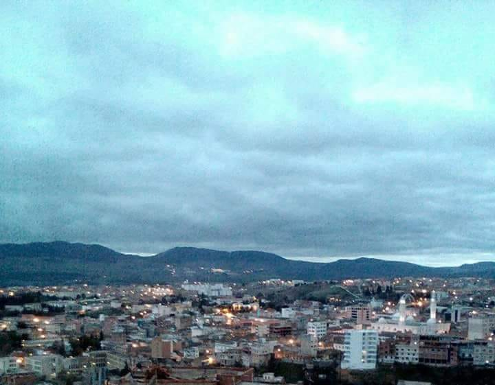 منظر عام لمدينة سوق أهراس